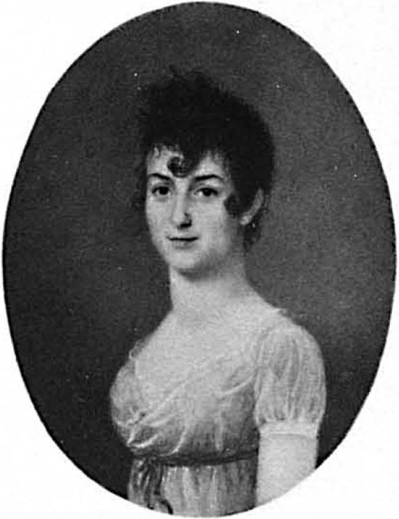 Мария Ивановна Ренни (1781-1810)